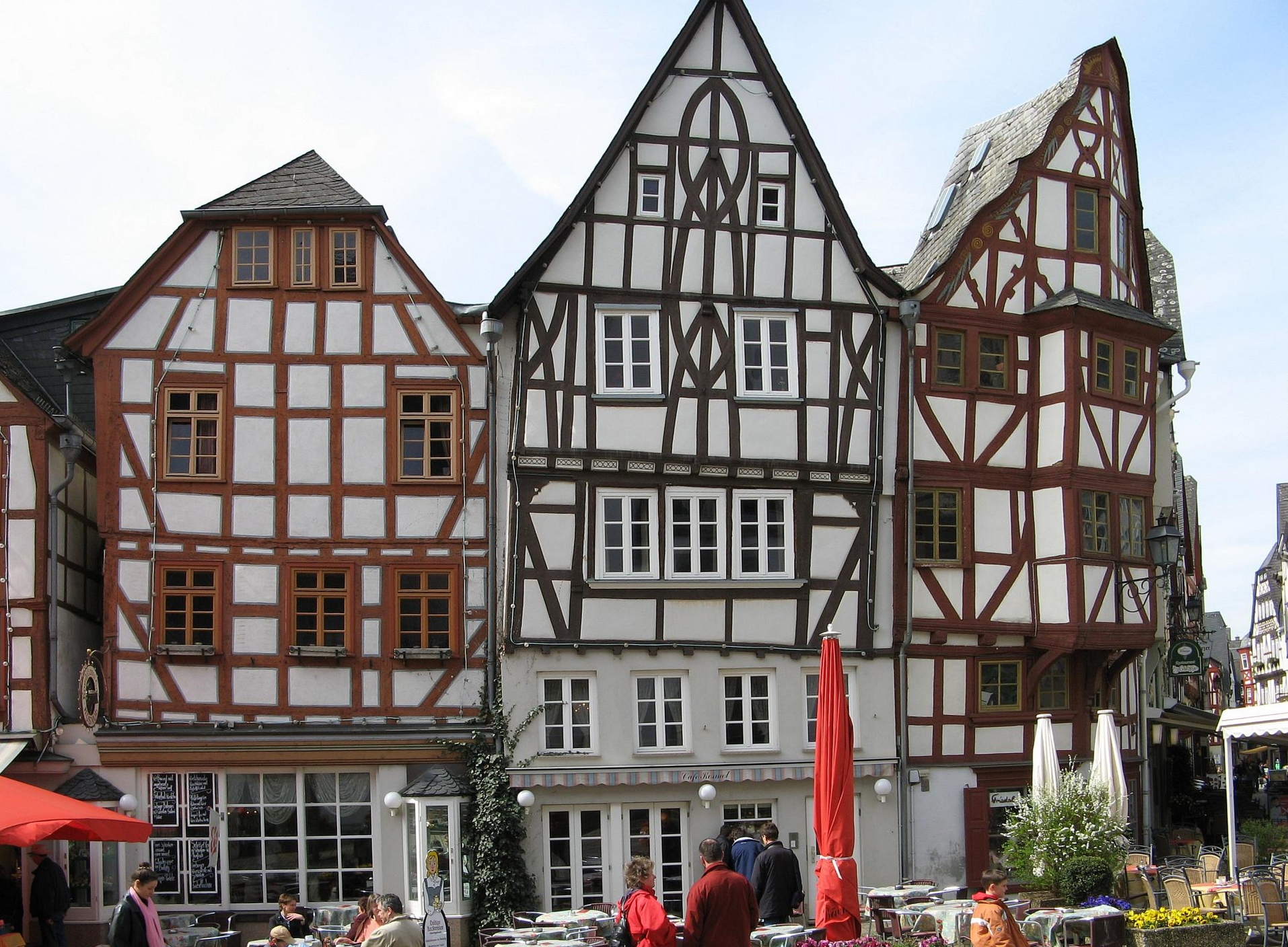 Die Häuser Bischofsplatz 5, 7 und 9 (von links) in der Altstadt von Limburg an der Lahn This is a picture of the hessian Kulturdenkmal (cultural monument) with the ID 53031